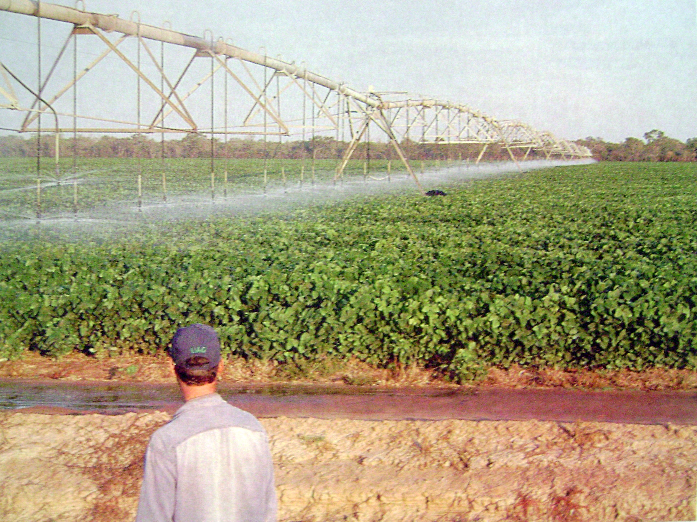 Producción de soja en Formosa (Argentina) con modernos sistemas de riego